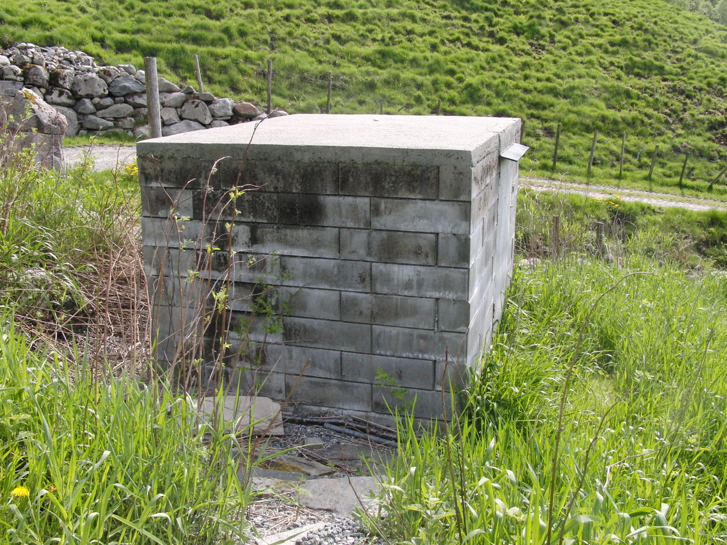 Østerhus kraftverk